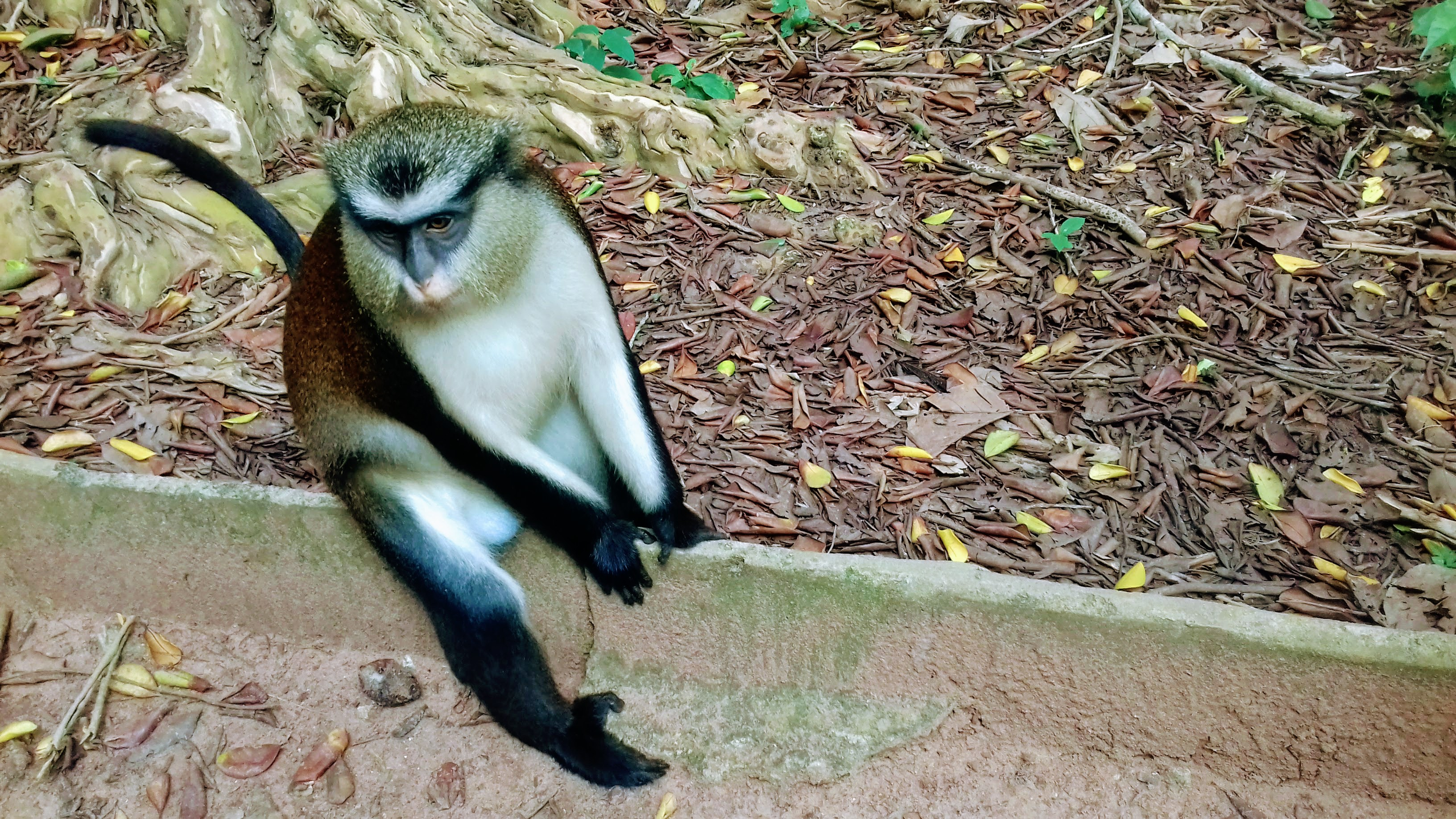 Ce singe blanc-noir mâle rencontré dans le Jardin des Plantes et de la Nature de Porto-Novo.